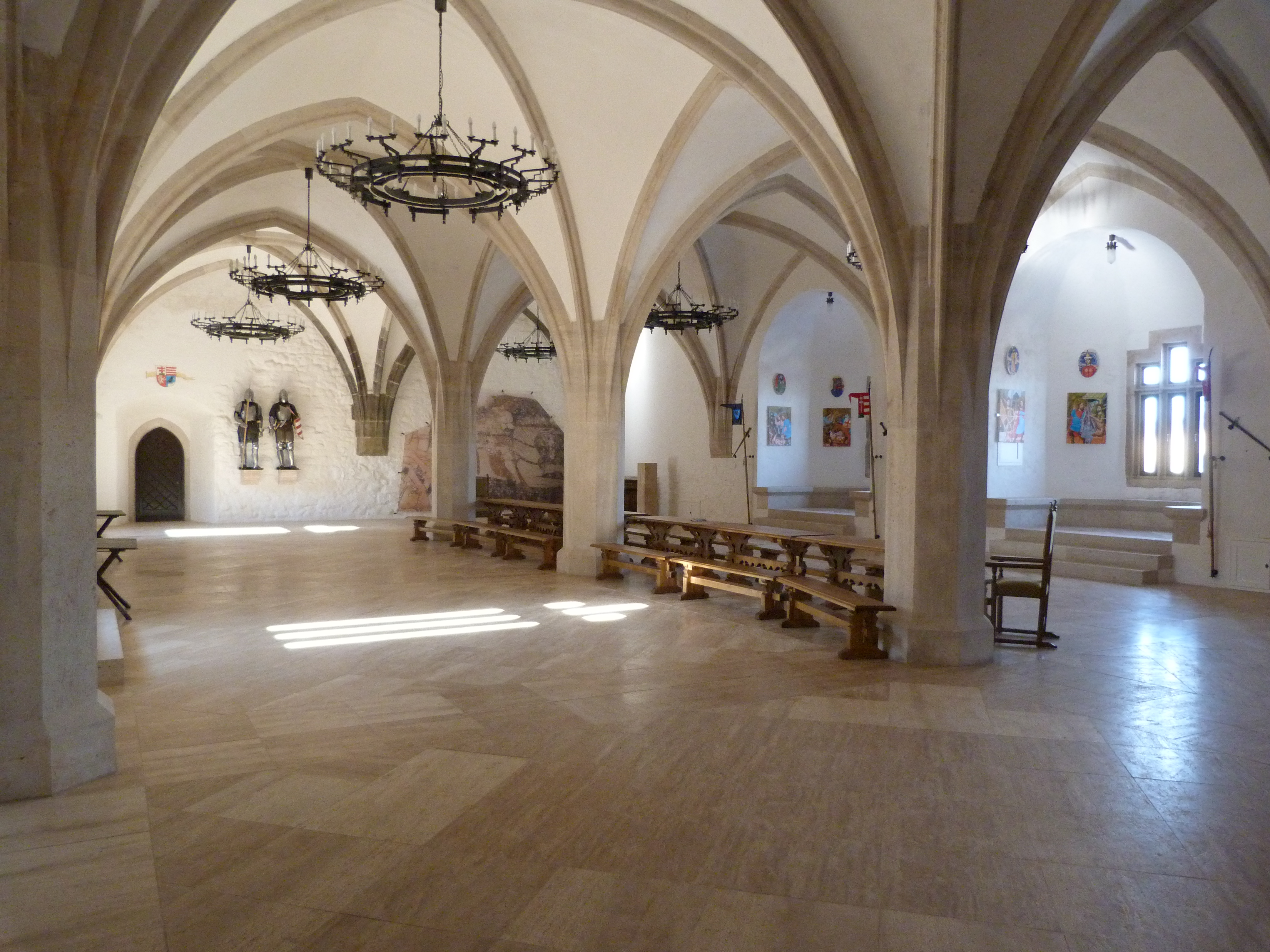 A felvétel 2015. február 7-én szombaton készült Diósgyőr Várában. ©© Derzsi Elekes Andor, Budapest, 2015, A fénykép másolását és felhasználását a szerző ellenérték nélkül, jogutódjaira is kihatóan megengedi. Az engedély kiterjed a kereskedelmi célú hasznosításra is. Kéri azonban nevének feltüntetését a felhasználás során. A Metapolisz sorozat valamennyi képe és filmje Creative Commons alatti valamint kereskedelmi - for profit - célra is felhasználható. Ajánlott hivatkozás: Derzsi Elekes Andor: Metapolisz DVD line